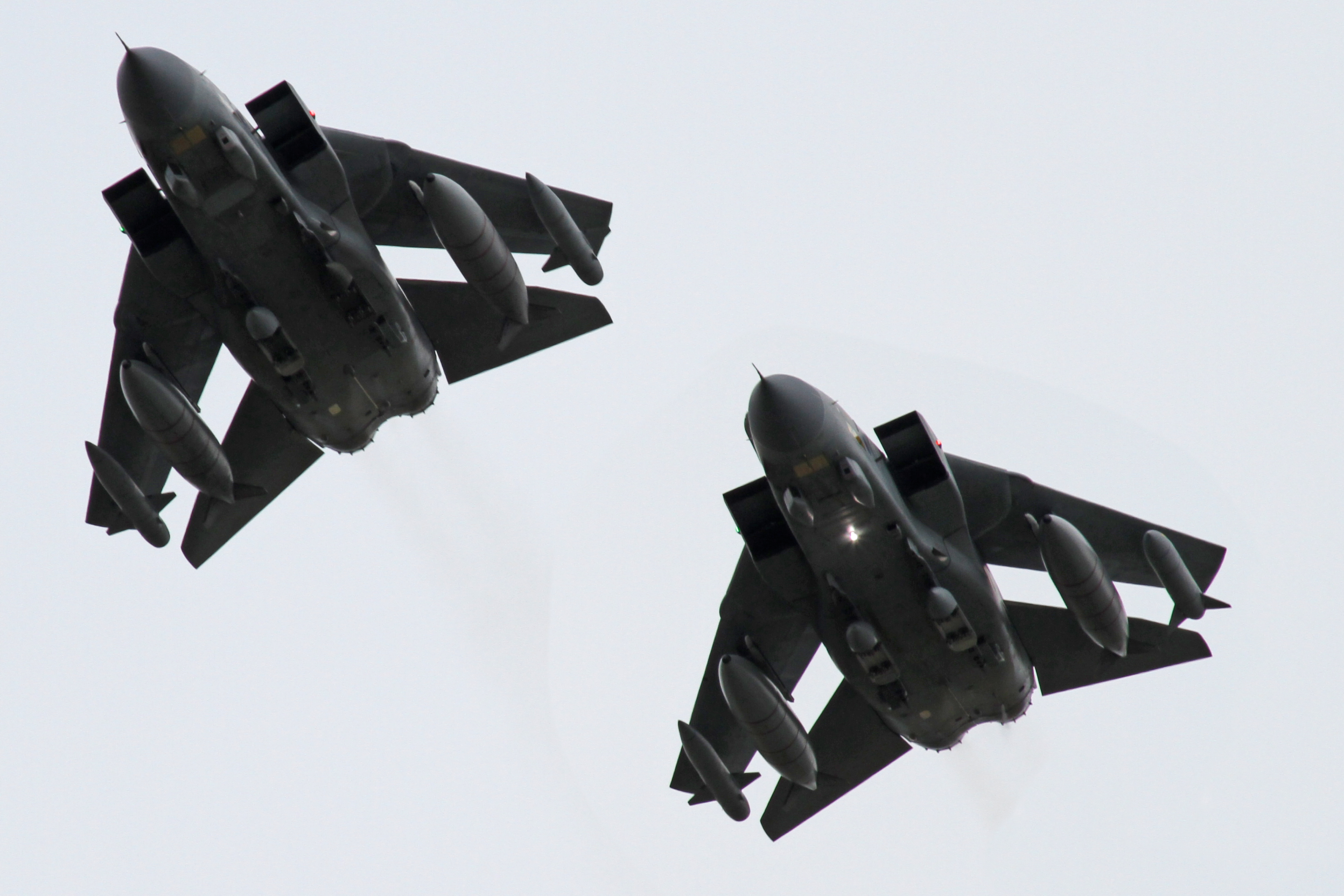 Panavia Tornado GR4 21